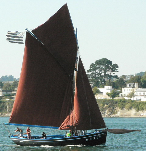 general leclerc sous voile dans l'elorn